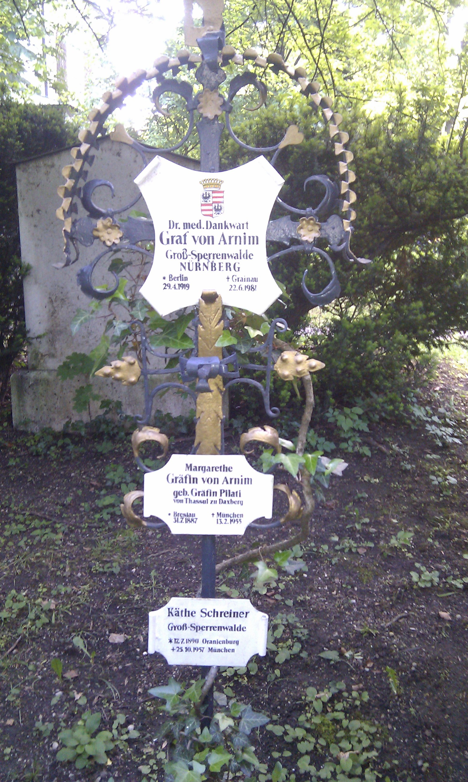 Grab auf dem Winthirfriedhof München: Dr. med. Dankwart Graf von Arnim Groß-Sperrenwalde Nürnberg (* 29. April 1919 in Berlin; † 22. Juni 1987 in Grainau) Gräfin Margarethe Henriette Leocadie Pilati von Thassul zu Daxberg (* 31. Juli 1887 in Breslau; † 13. Februar 1955 in München) Käthe Schreiner Groß-Sperrenwalde (* 17. Juli 1890 in Oranienburg; † 25. Oktober 1957 in München)